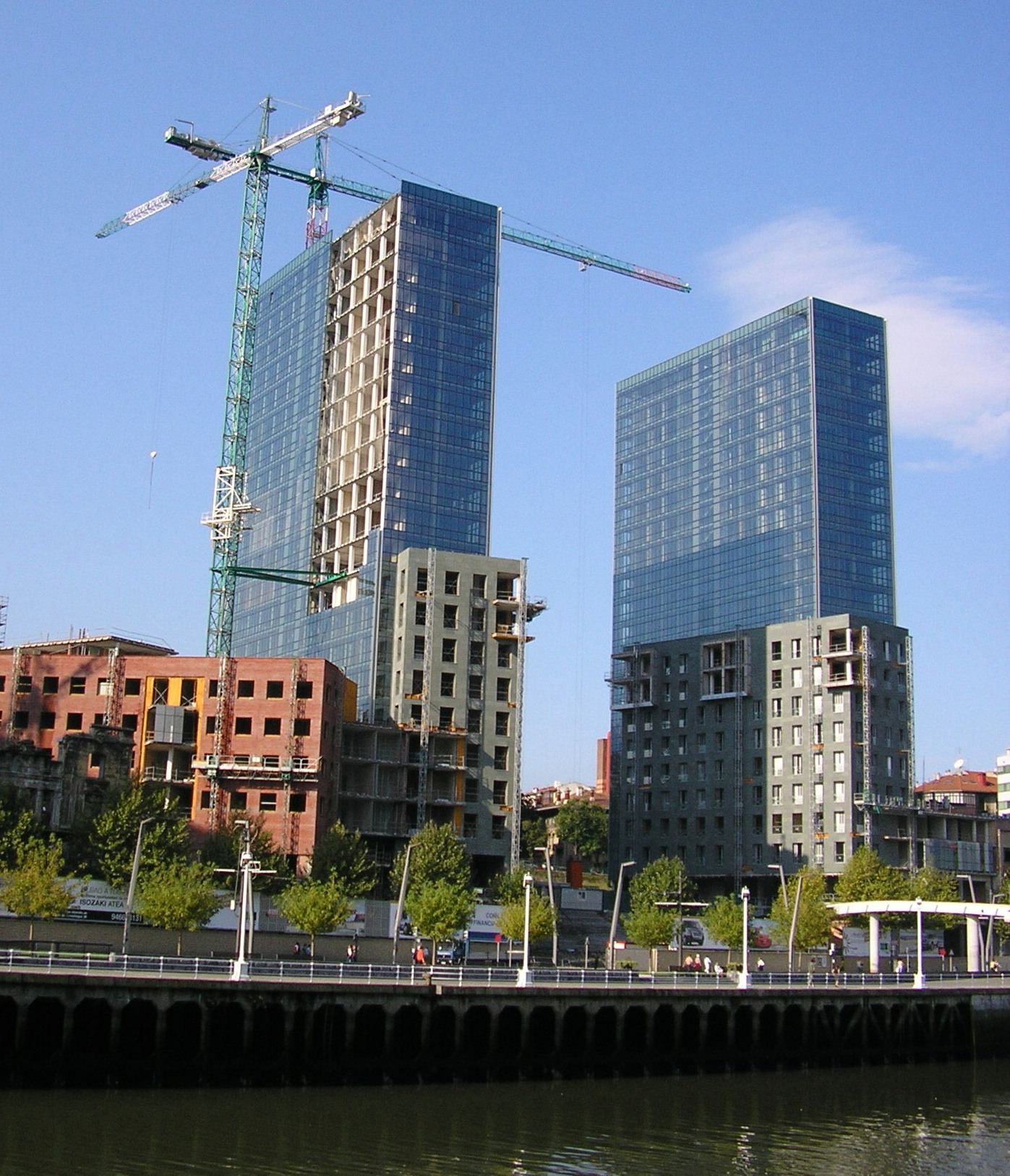 Isozaki Dorreak, Campo Volantinetik ikusiak.